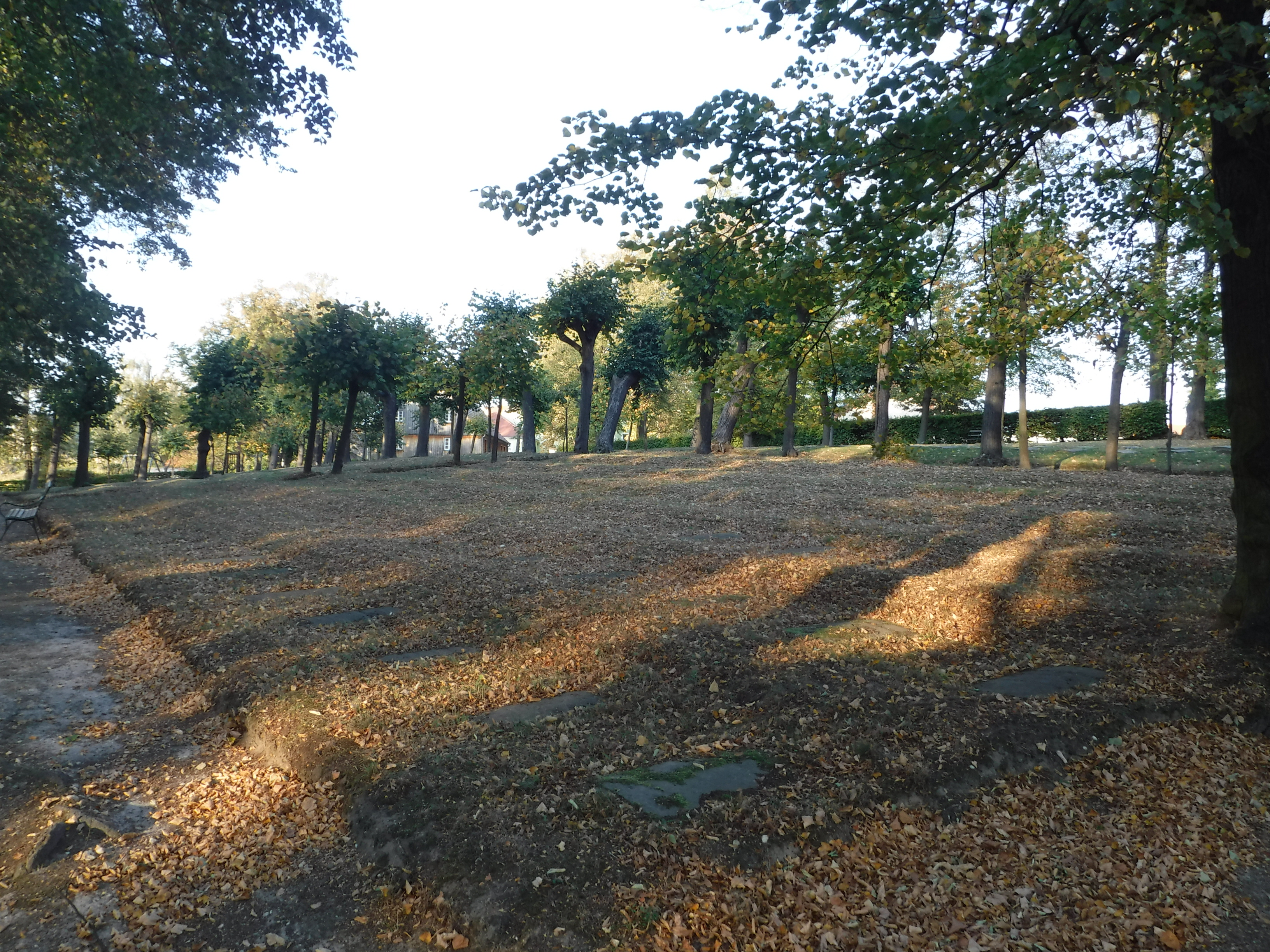 Gottesacker Kleinwelka Hornjoserbsce: Ochranowski kěrchow w Małym Wjelkowje